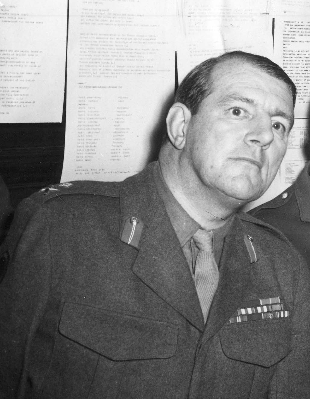 Geoffrey Bourne 1948 Britischer Stadtkommandant von Berlin